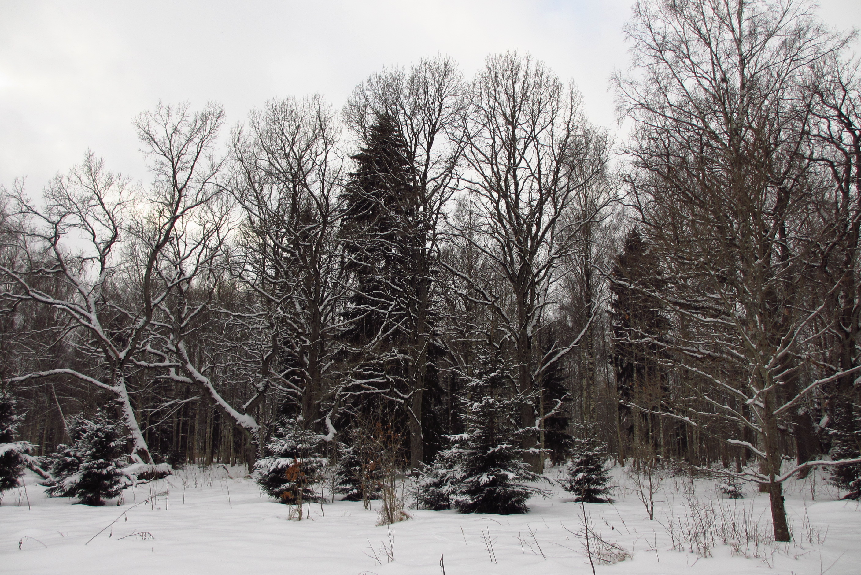 Mäetaguse tammik Mäetaguse MKA-l talvel